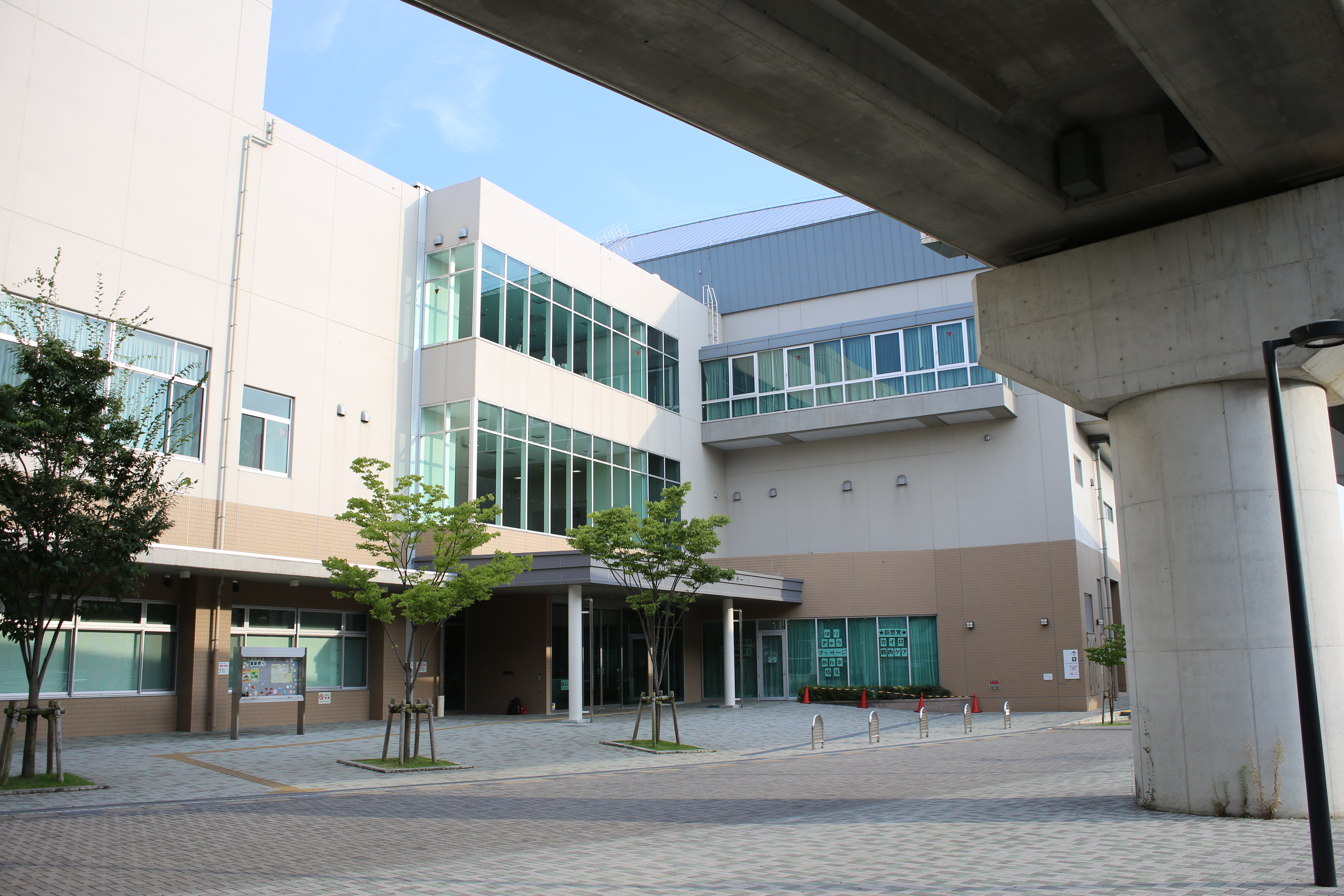 名古屋市守山区竜泉寺二丁目の名古屋市守山スポーツセンターを西側公道北側より撮影